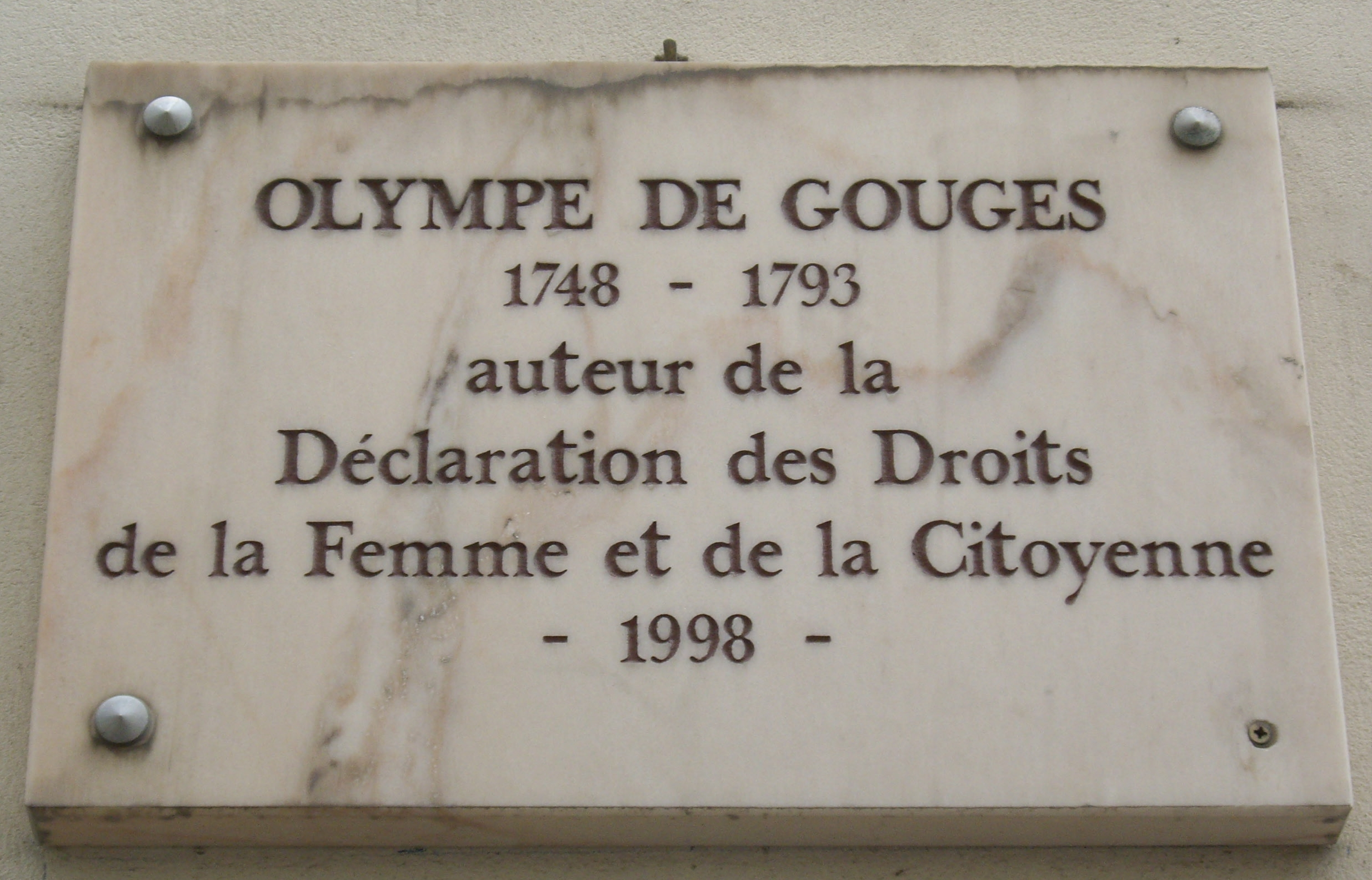 Plaque apposée au n° 20 de la rue Servandoni, Paris 6e, où résida Olympe de Gouges (1748-1793), auteur de la Déclaration des droits de la femme et de la citoyenne.